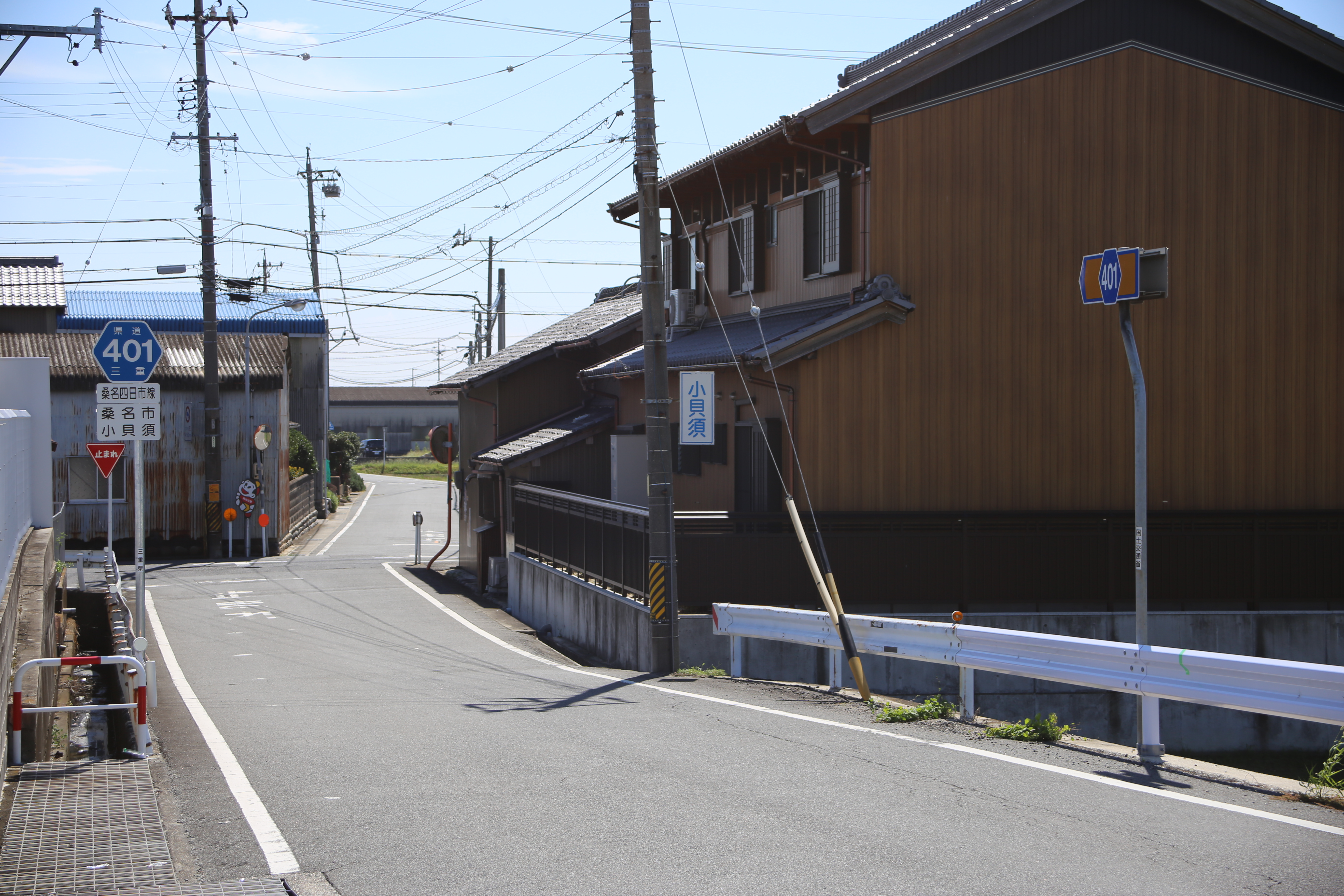 三重県桑名市小貝須の三重県道401号